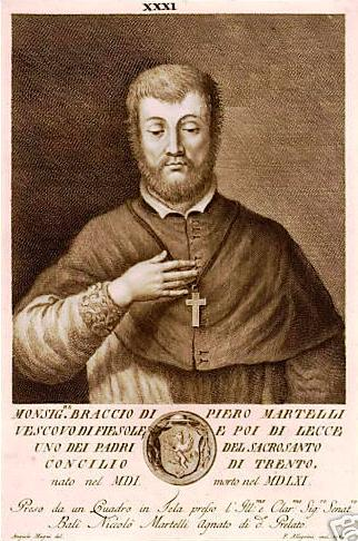 Monsignor Braccio Martelli in un'incisione dell'Epoca.